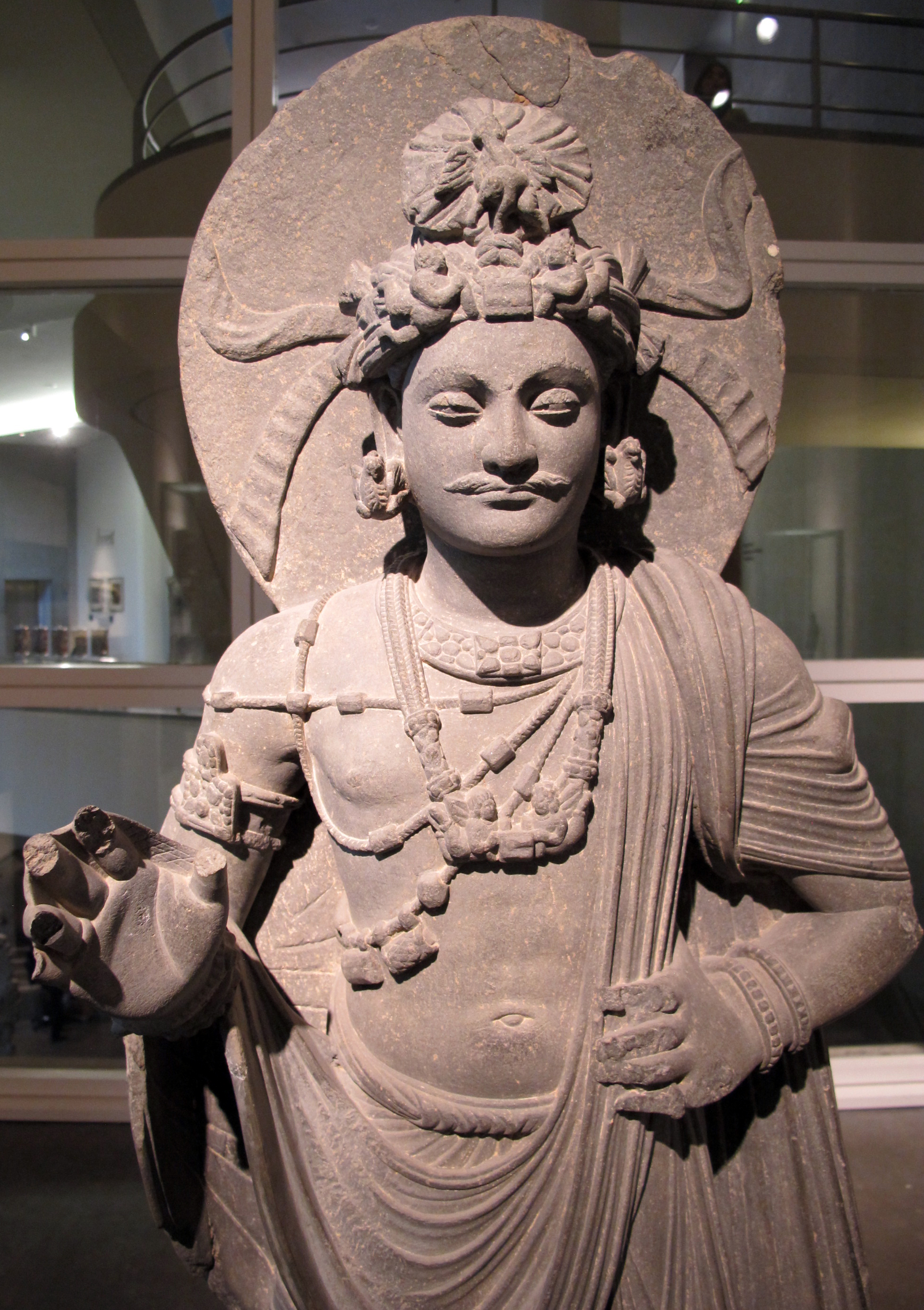 Gandhara, bodhisattva stante, I-III sec